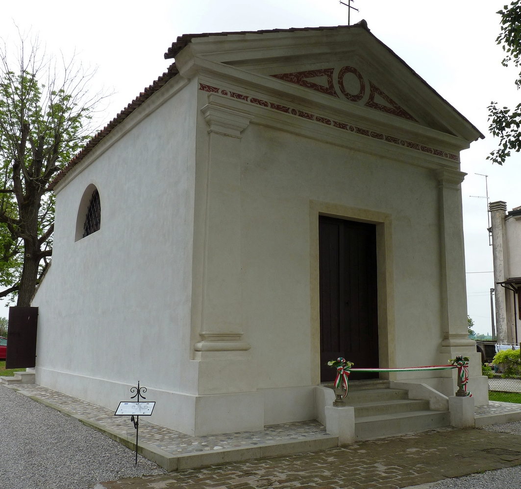 Oratorio San Gaetano dopo la ristrutturazione del 2015